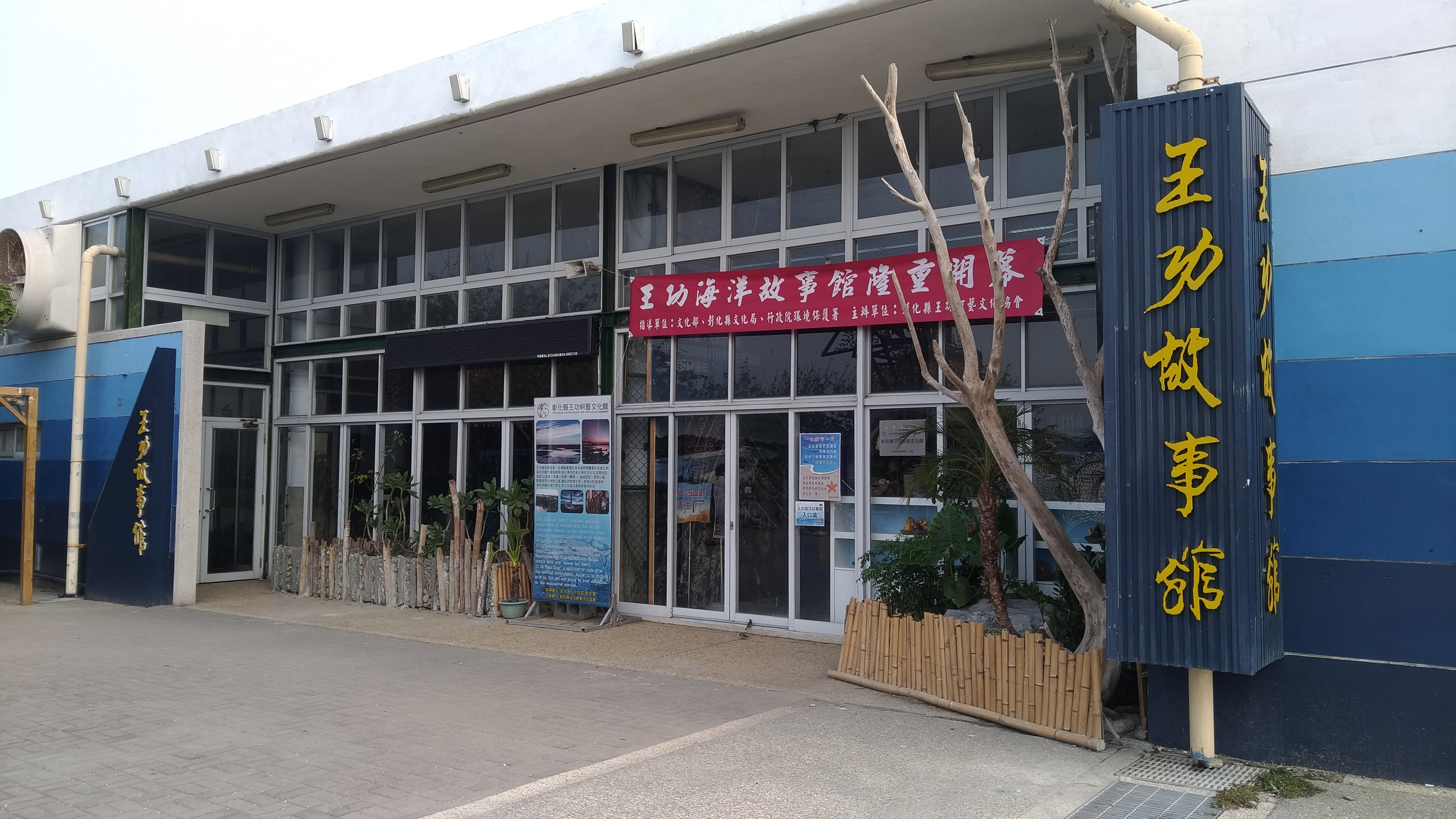 位於台灣彰化縣芳苑鄉的王功海洋故事館，攝於2018年3月